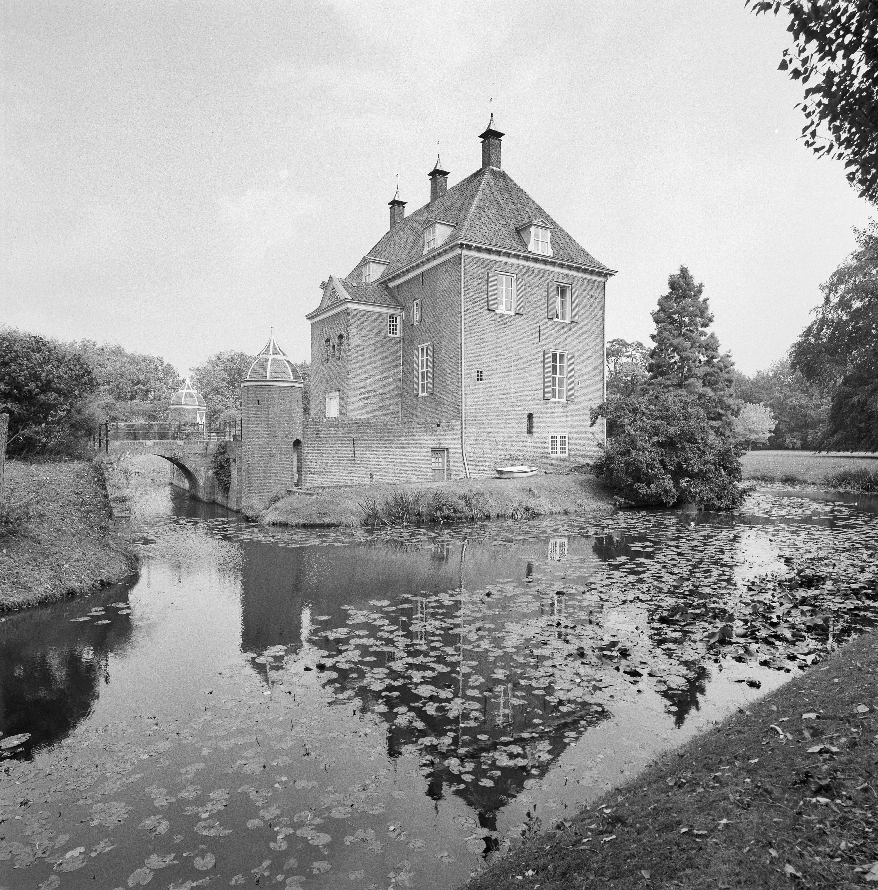 Kasteel Ophemert: Exterieur OVERZICHT (opmerking: PUBL.: PRIVATE COUNTRY HOUSES)